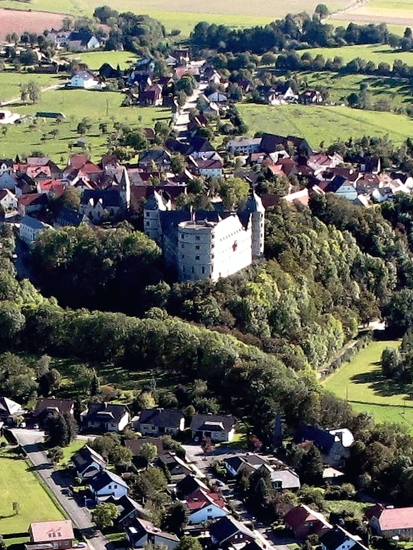 Luftbild aus Richtung Norden des Ortsteils Wewelsburg der Stadt Büren im Kreis Paderborn, Nordrhein-Westfalen, Deutschland.